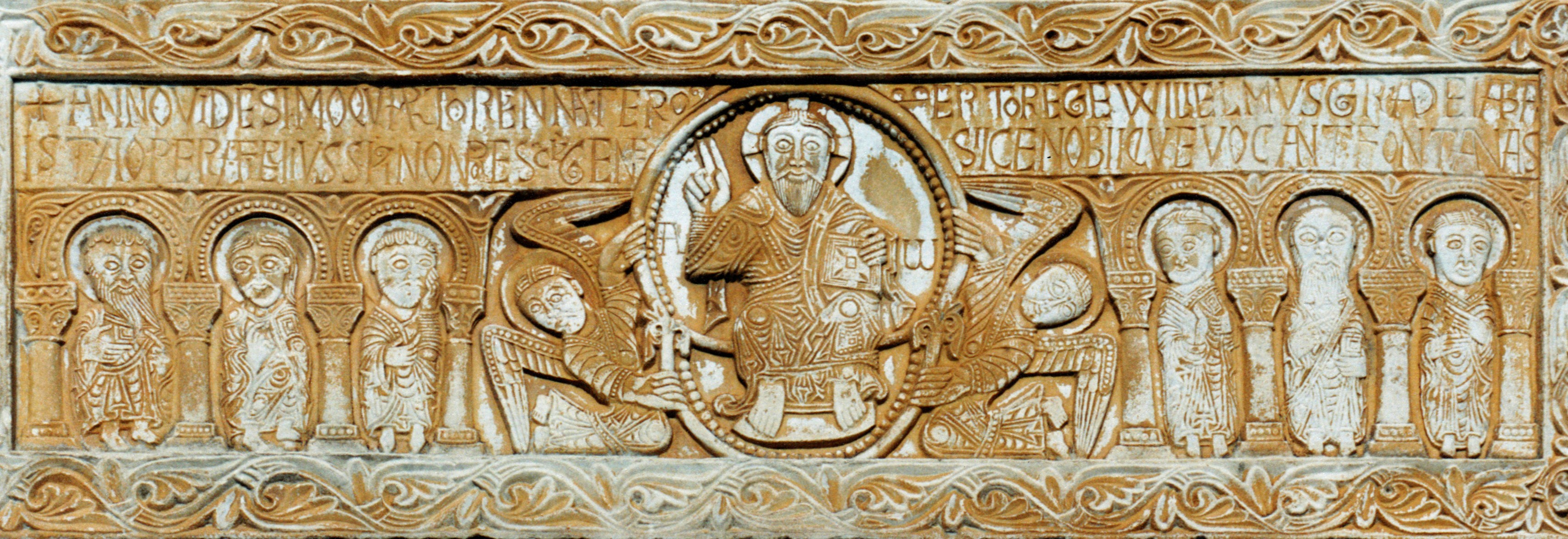 France - Roussillon - Albères - Saint-Génis-des-Fontaines : linteau avec arcs outrepassés